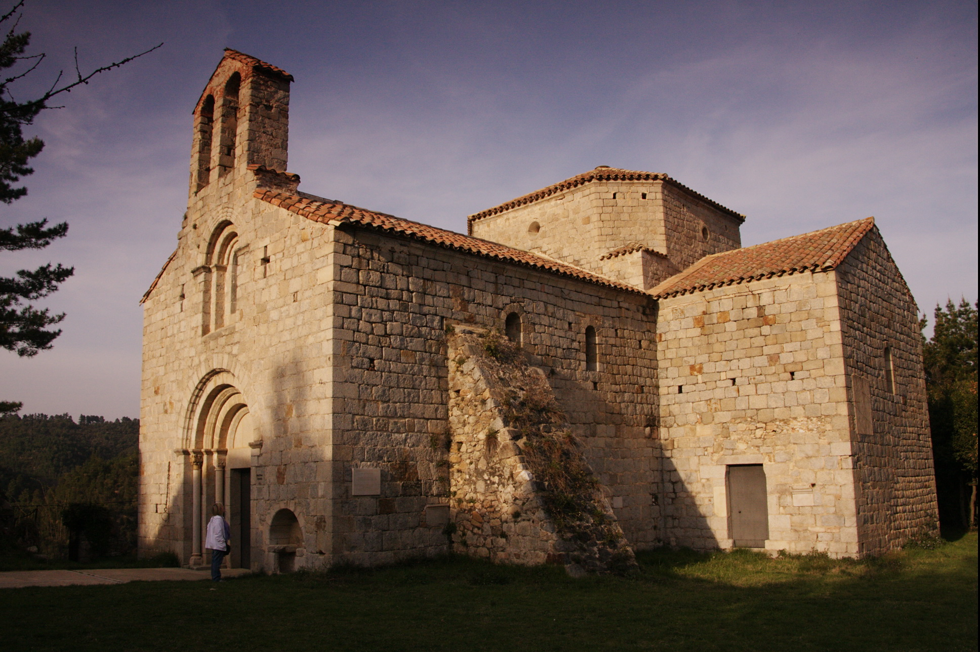 Sant Pere Cercada (Santa Coloma de Farners-Catalunya). Original de 1063, fou un monestir agustinià al 1136. Actualment només resta l'església